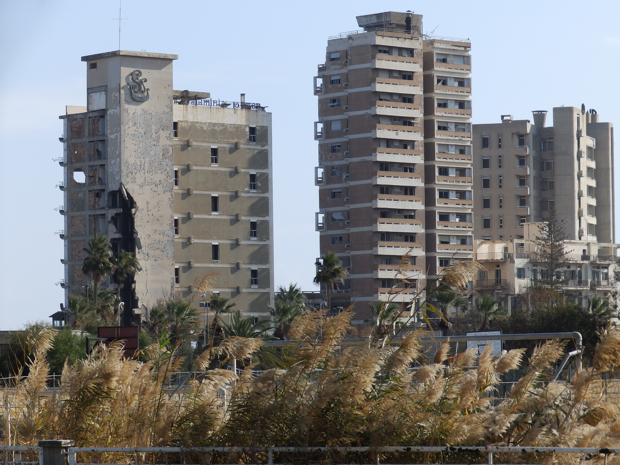 3 verlassene Hotels in Verosia